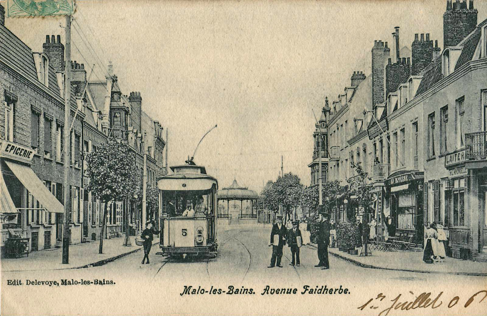 Carte postale ancienne éditée par Delevoye à Malo-sur-Mer :MALO-LES-BAINS - Avenue Faidherbe.Vue de la motrice n°6, dans son état d'origine, du tramway de Dunkerque